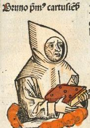 Bruno le Chartreux dans le livre de Hartmann Schedel, « La Chronique de Nuremberg », Bibliothèque Mondiale Numérique, 1493, p. 460. ( Illustration par Wilhelm Pleydenwurff et Michael Wolgemut.